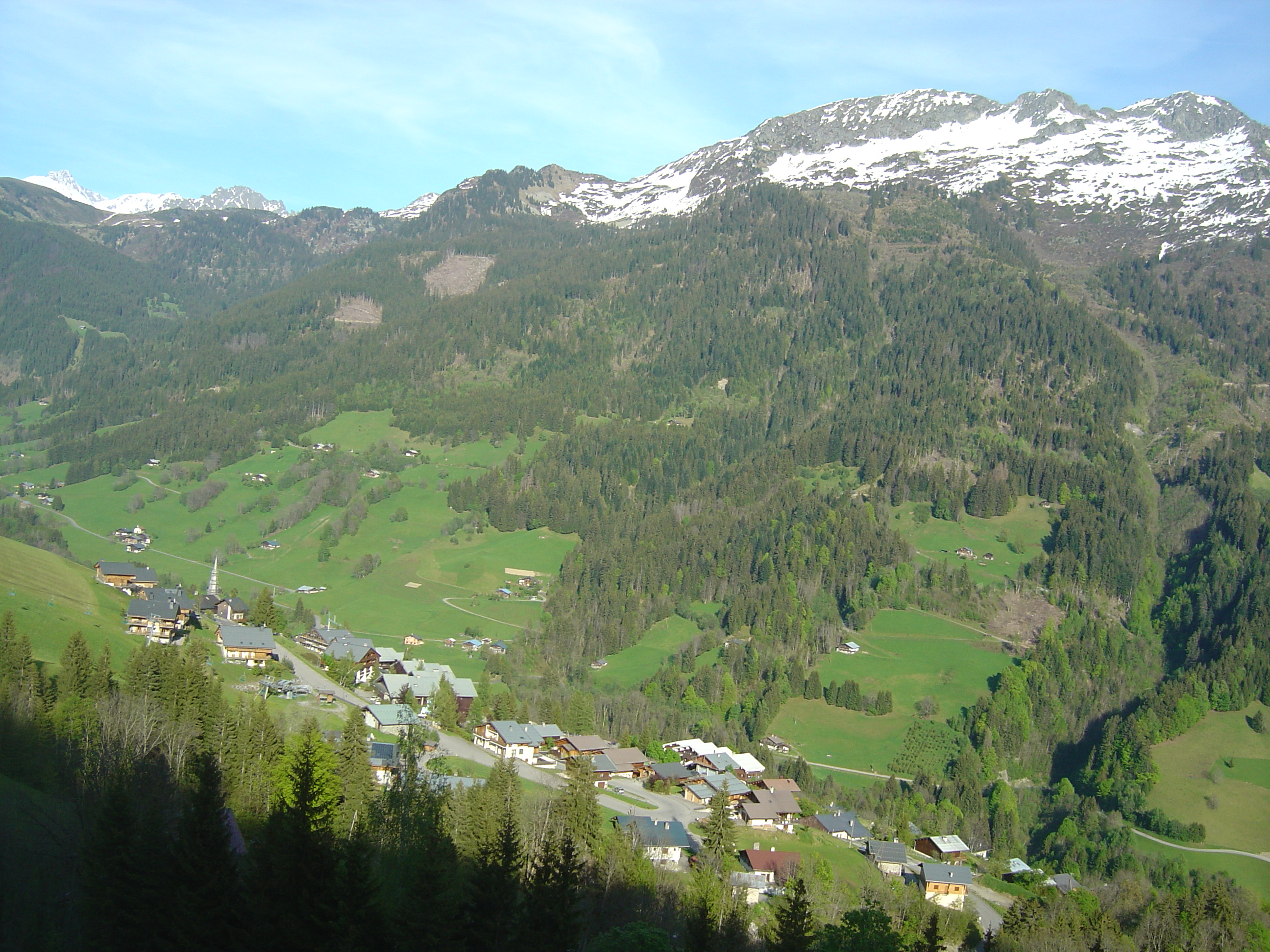 Village de Hauteluce vu depuis la route du versant Sud du col des Saisies